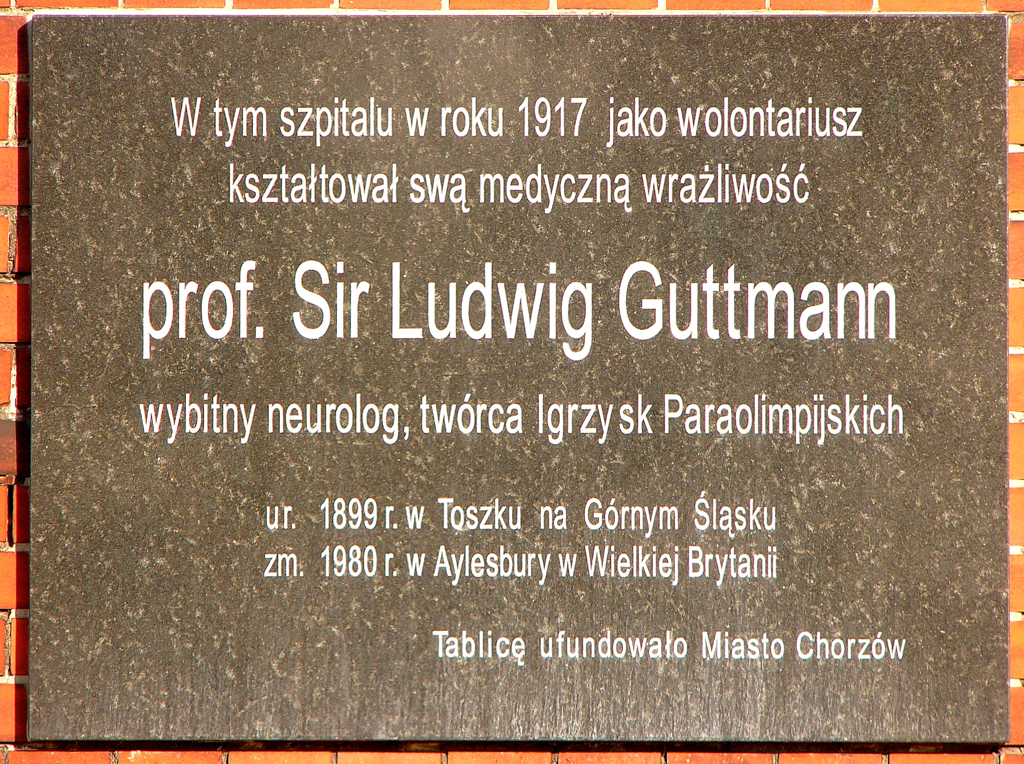 Gedenktafel für Ludwig Guttmann an der Wand des Krankenhauses in der Grenzstr. / Strzelców Bytomskich in Königshütte in Oberschlesien.